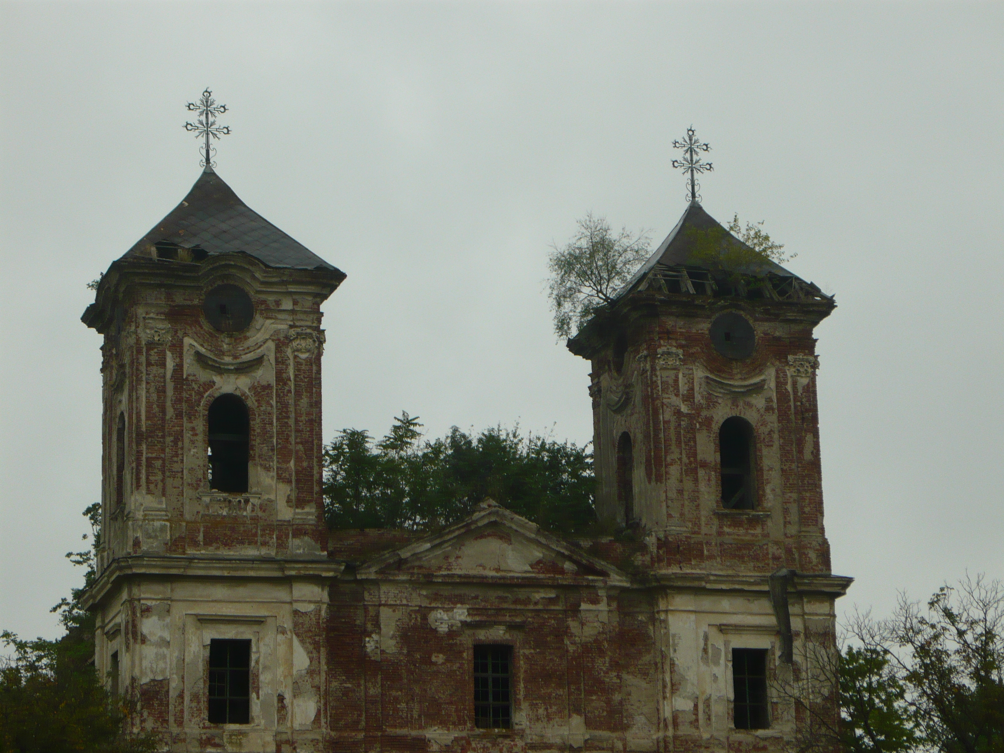 Biserica franciscană din Cetatea Aradului 03